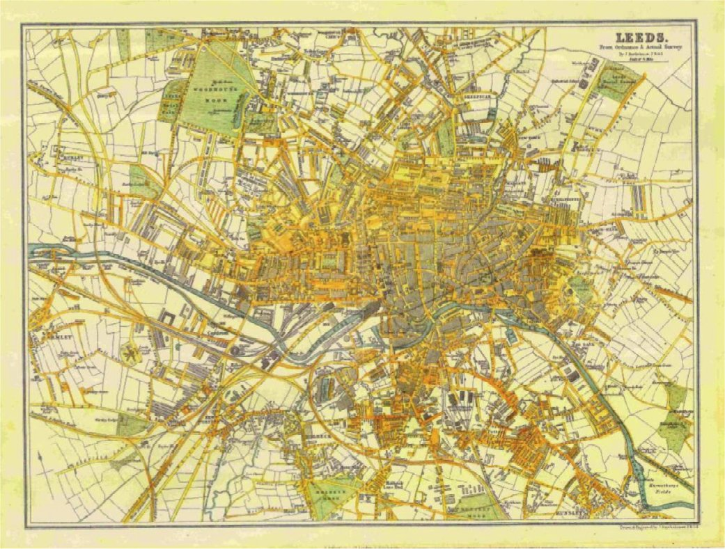 Leeds Map 1864